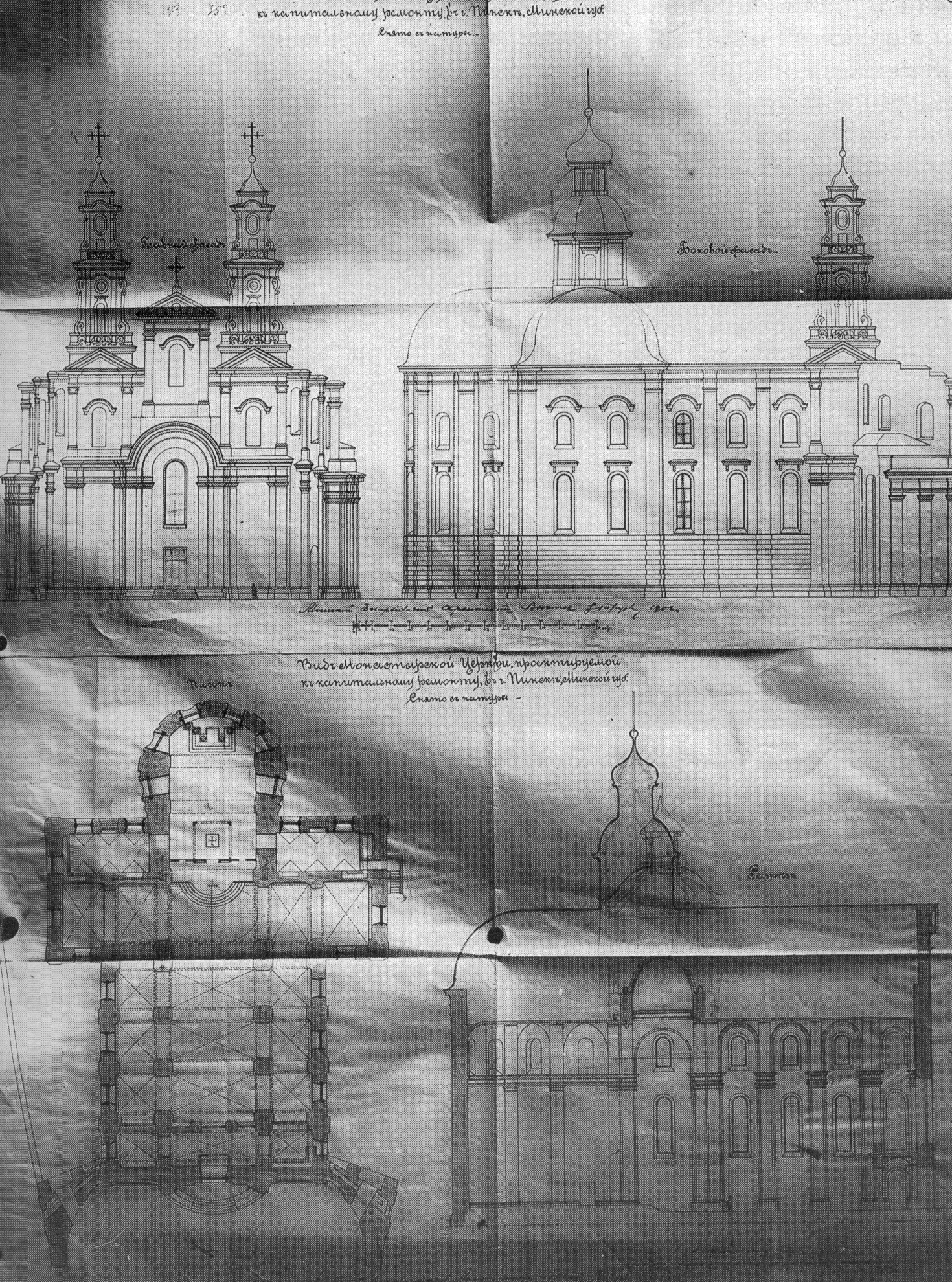 Беларуская (тарашкевіца): Пінск (Pinsk), пляц Рынак (plac Rynak). Сьвятога Станіслава і калегіюм езуітаў, абмеры